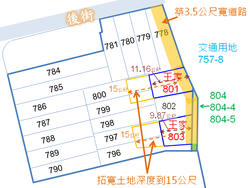 中文（台灣）: 王家原地重建方案說明： 1.加大深度超過15米使土地面積擴大。 2.築路連接其他道路拿到建築線。